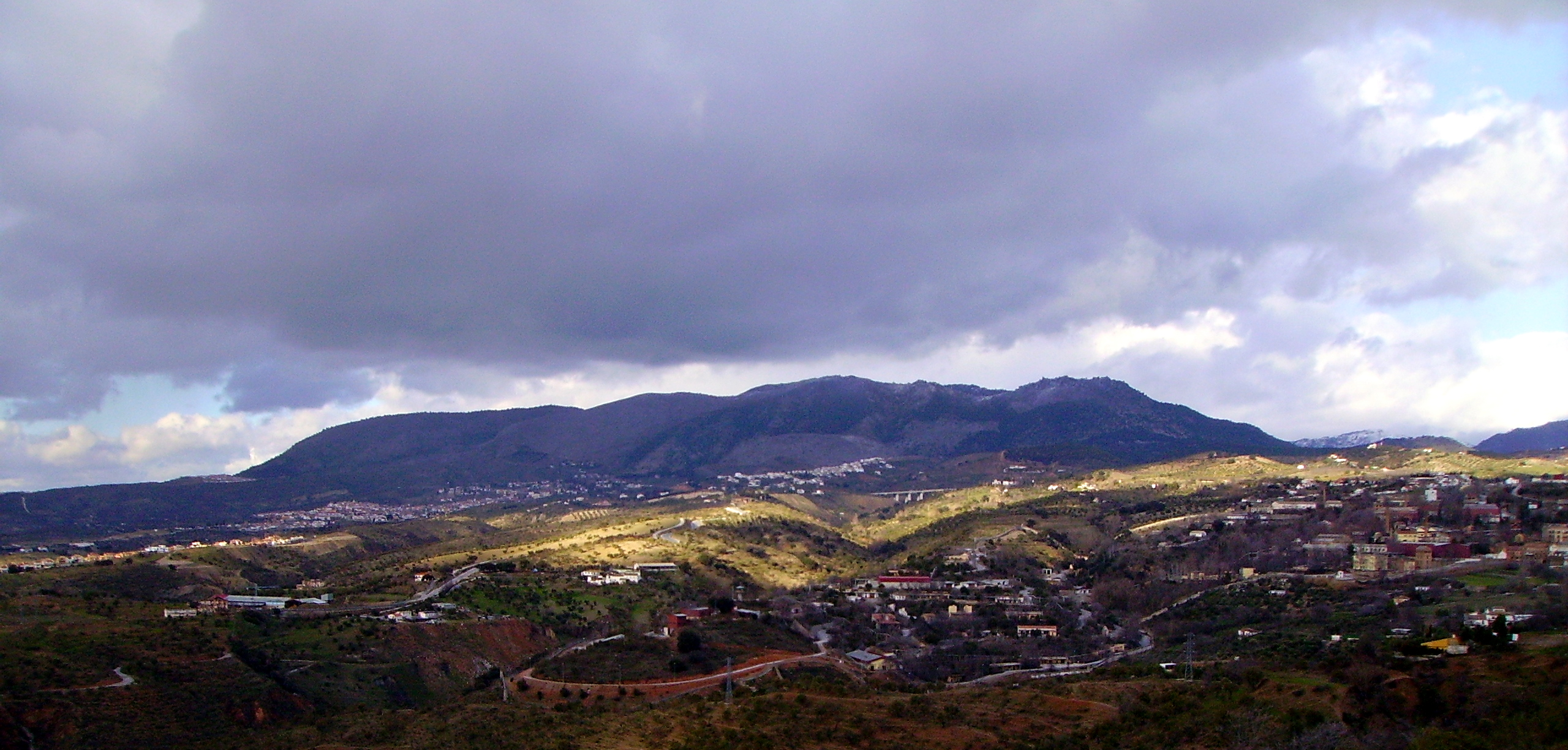 Alqueria del Fargue